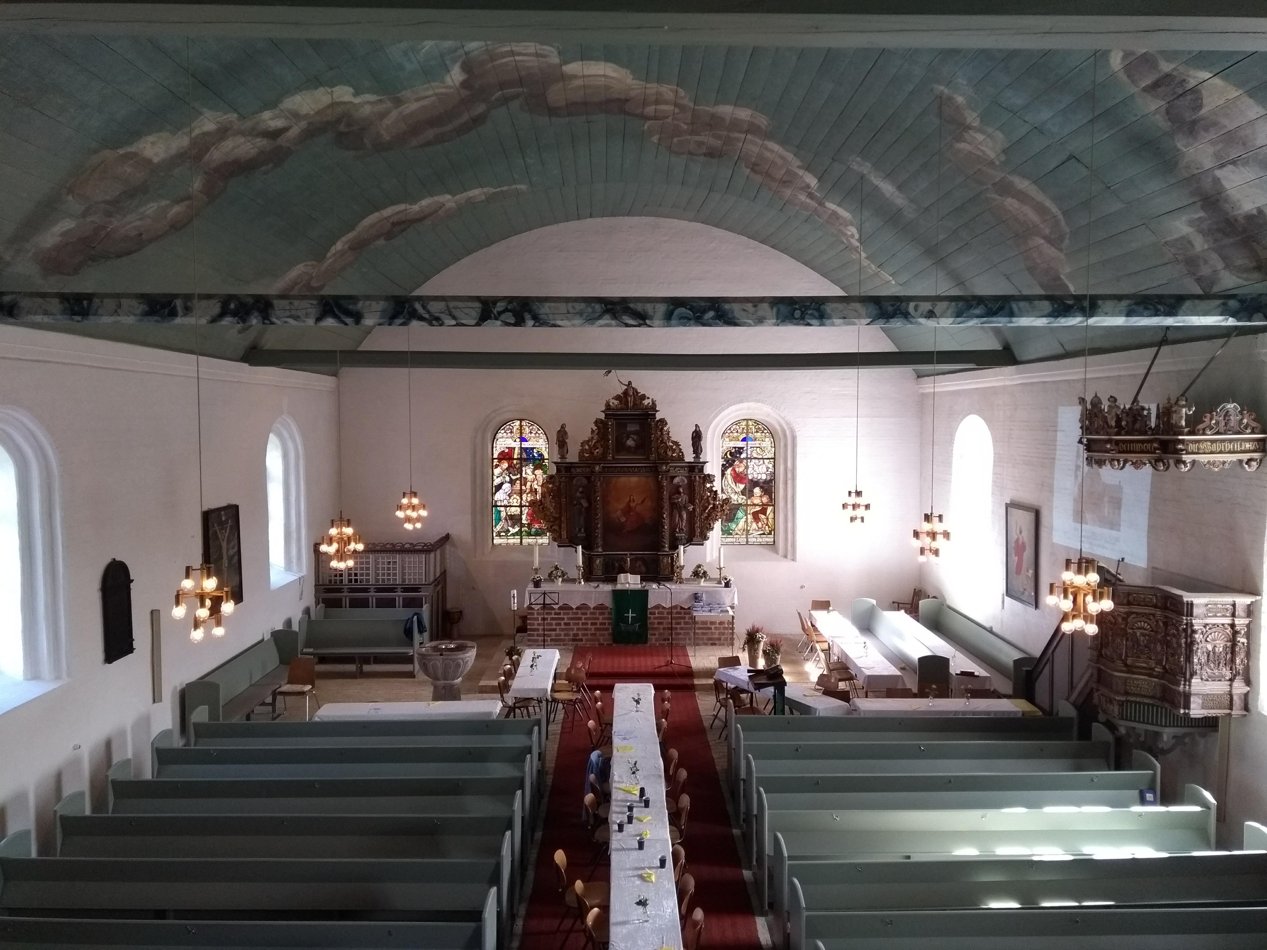 Innenraum der 1768 erbauten Rimberti-Kirche in Emmelsbüll - Blick von der Empore zum Altar - anlässlich des 250. Jubiläums aufgenommen